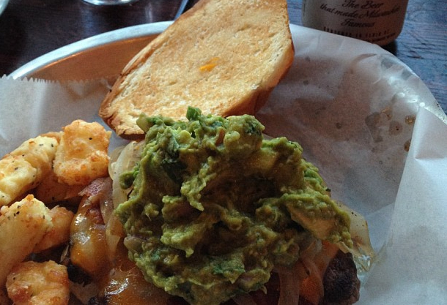 Hasenpfeffer